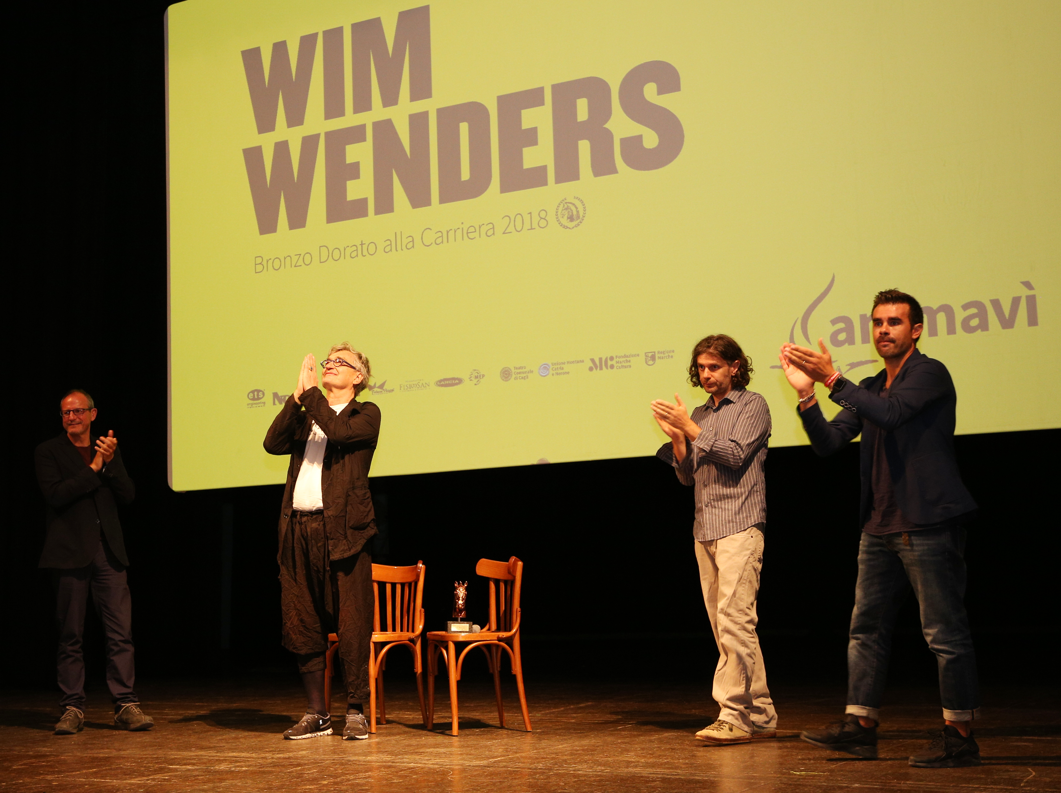 Wim Wenders riceve il Bronzo Dorato alla carriera 2018 ad Animavì - Festival Internazionale del Cinema di Animazione Poetico